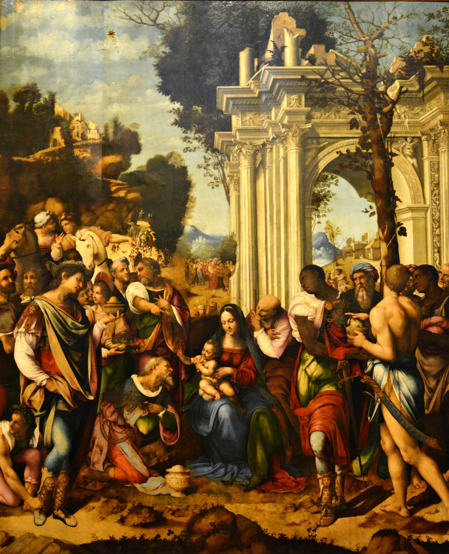 Vedi titolo